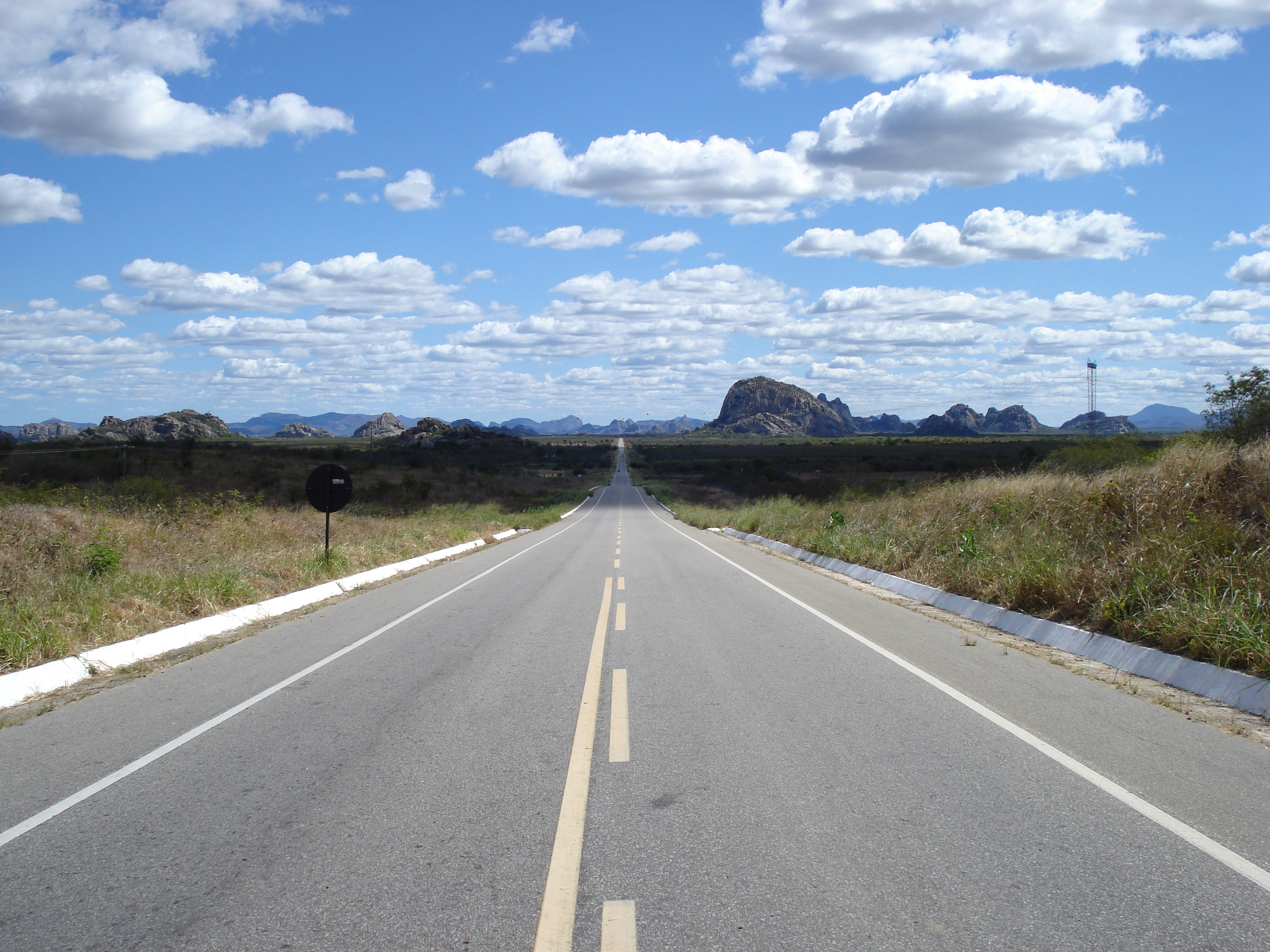 Rodovoa BR-122 próximo a Quixadá